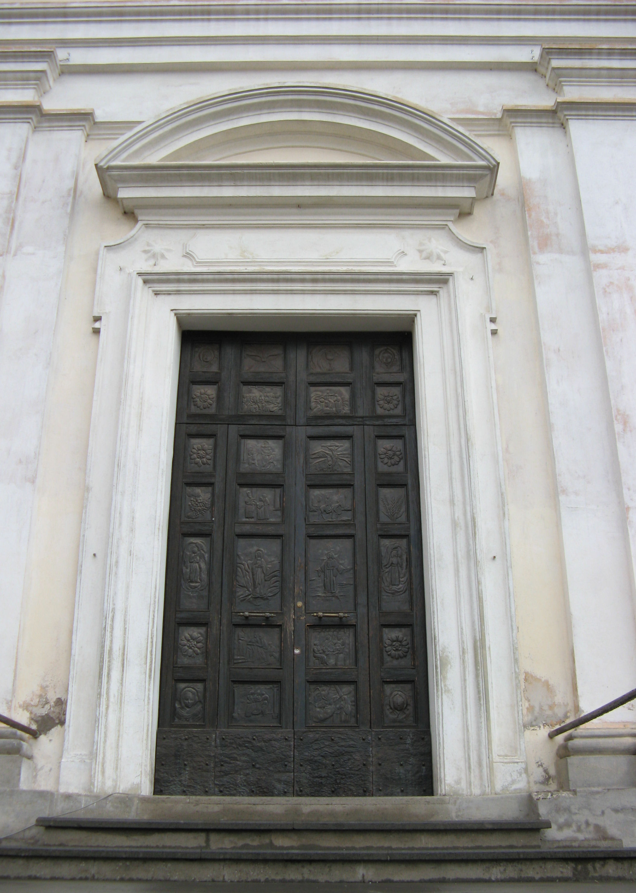 Genzano di Roma: Portone della Chiesa di Santa Maria della Cima (sec. XVII)